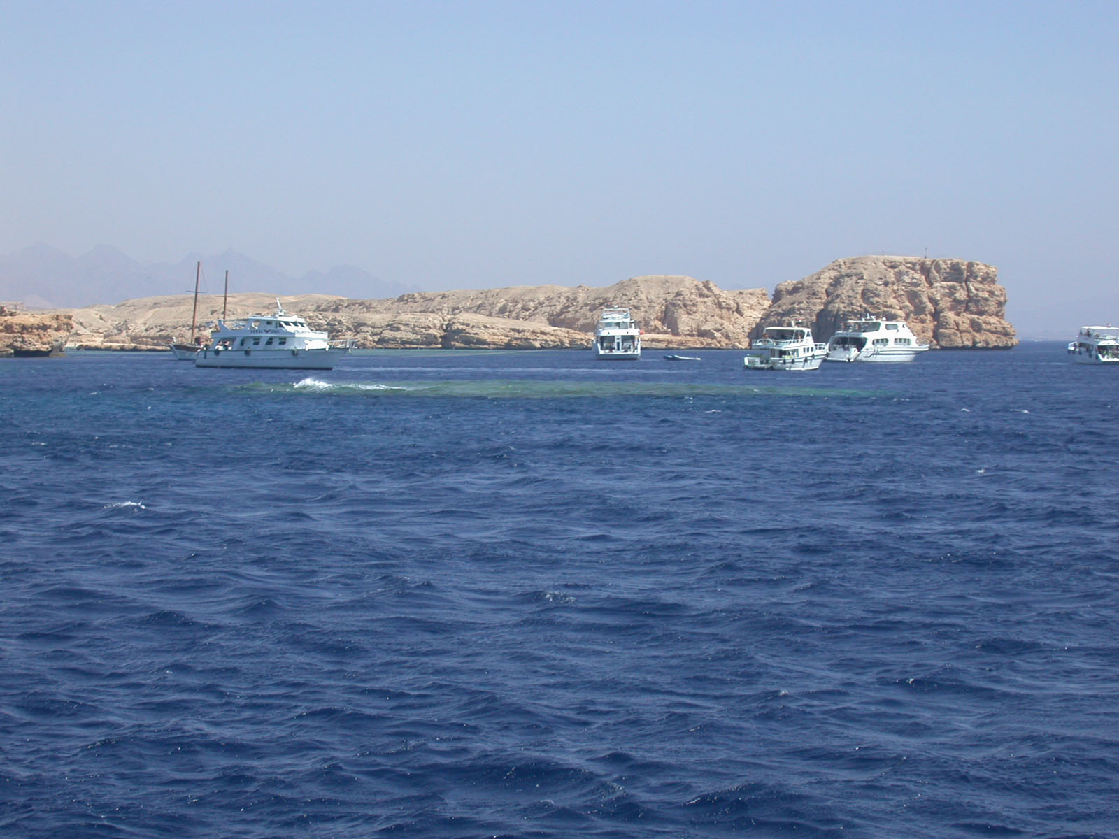 Ras Mohammed Nationalpark. Blick auf das Yolanda und Shark Reef an der Südspitze der Sinai Halbinsel. Fotografiert am 20.08.2003 um 08:50. *Fotograf: Johannes Ehm